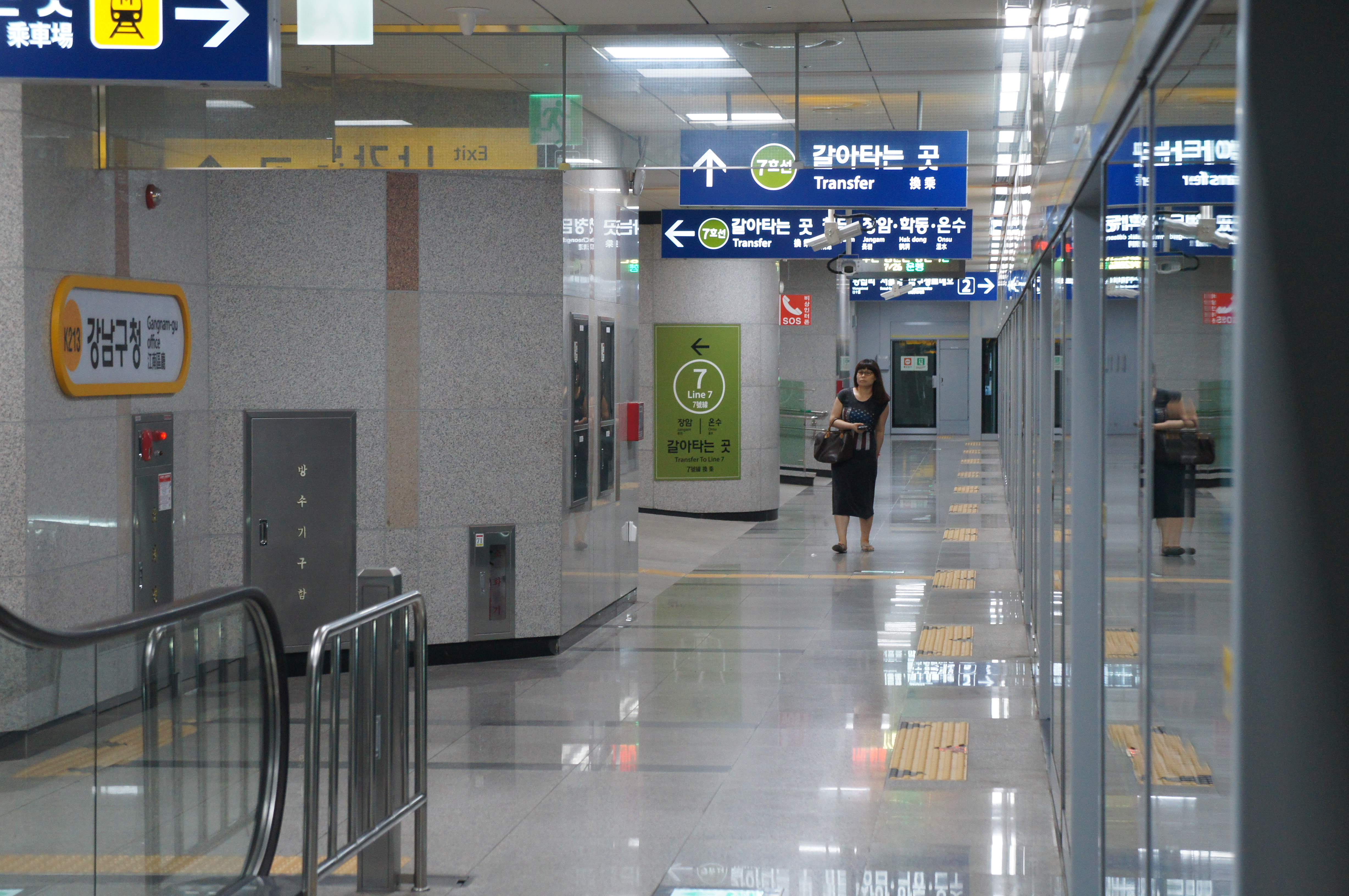 분당선 강남구청역 승강장